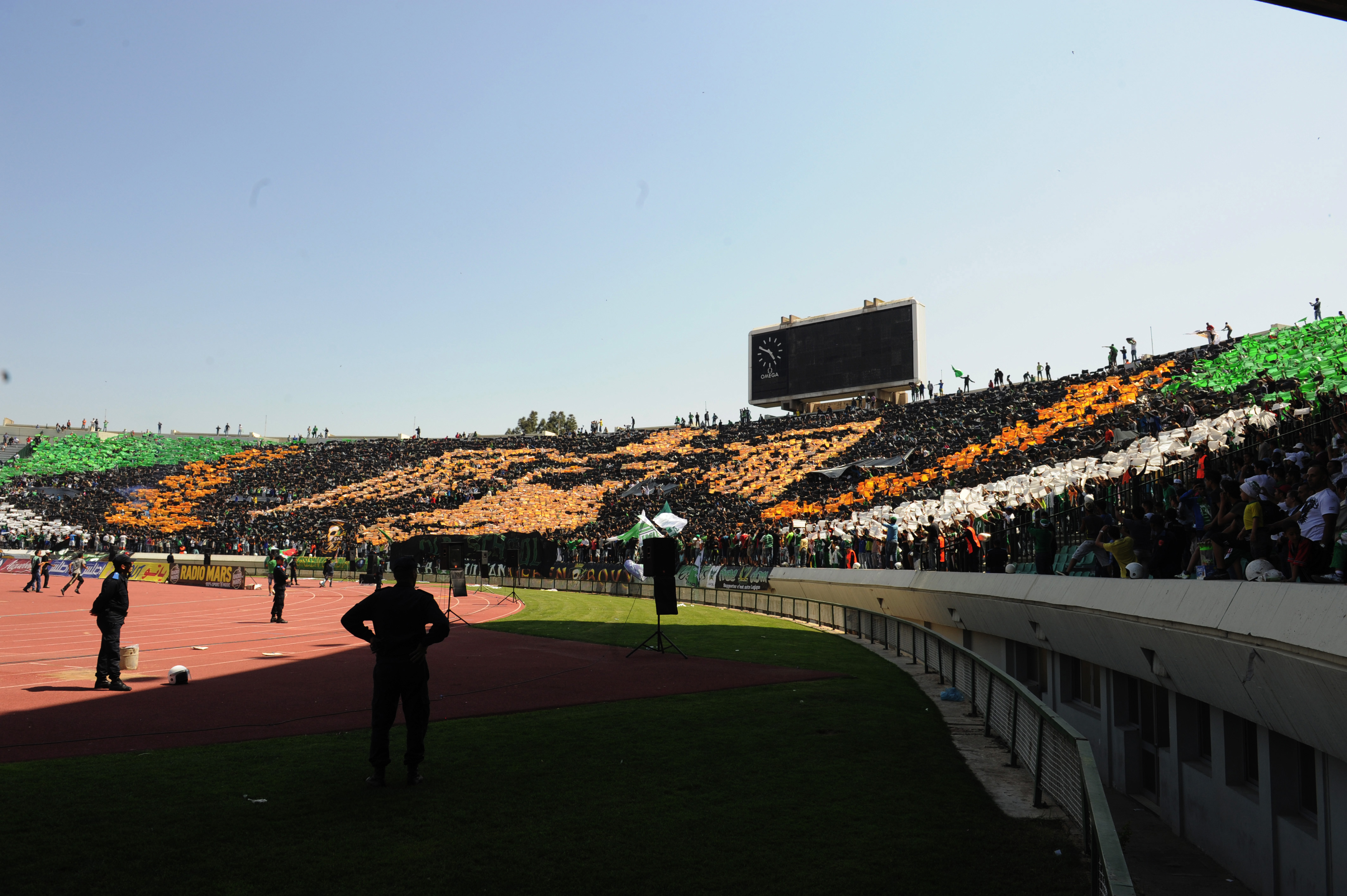 Raja vs FAR